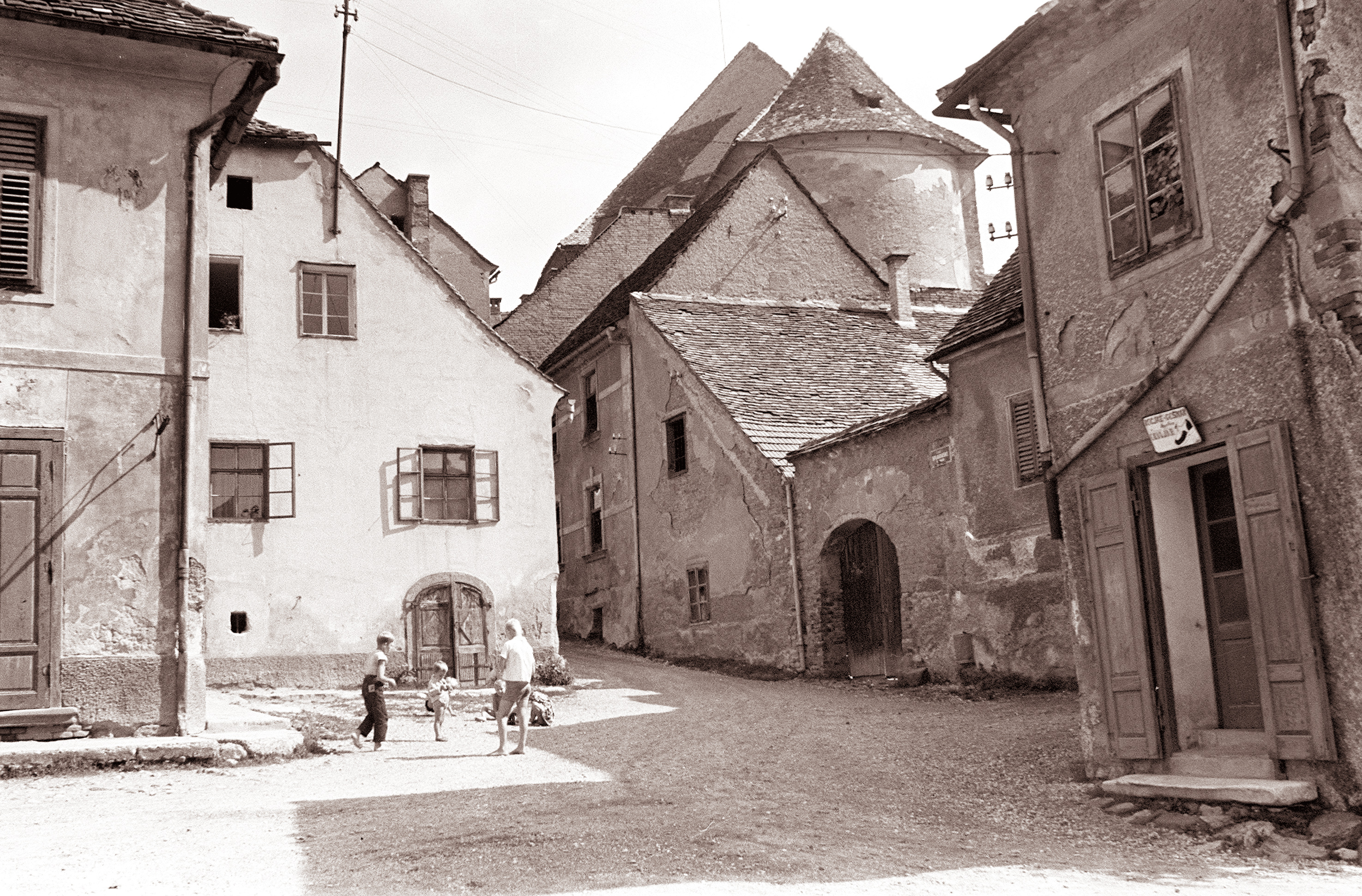 Vojašniška ulica - stari Lent